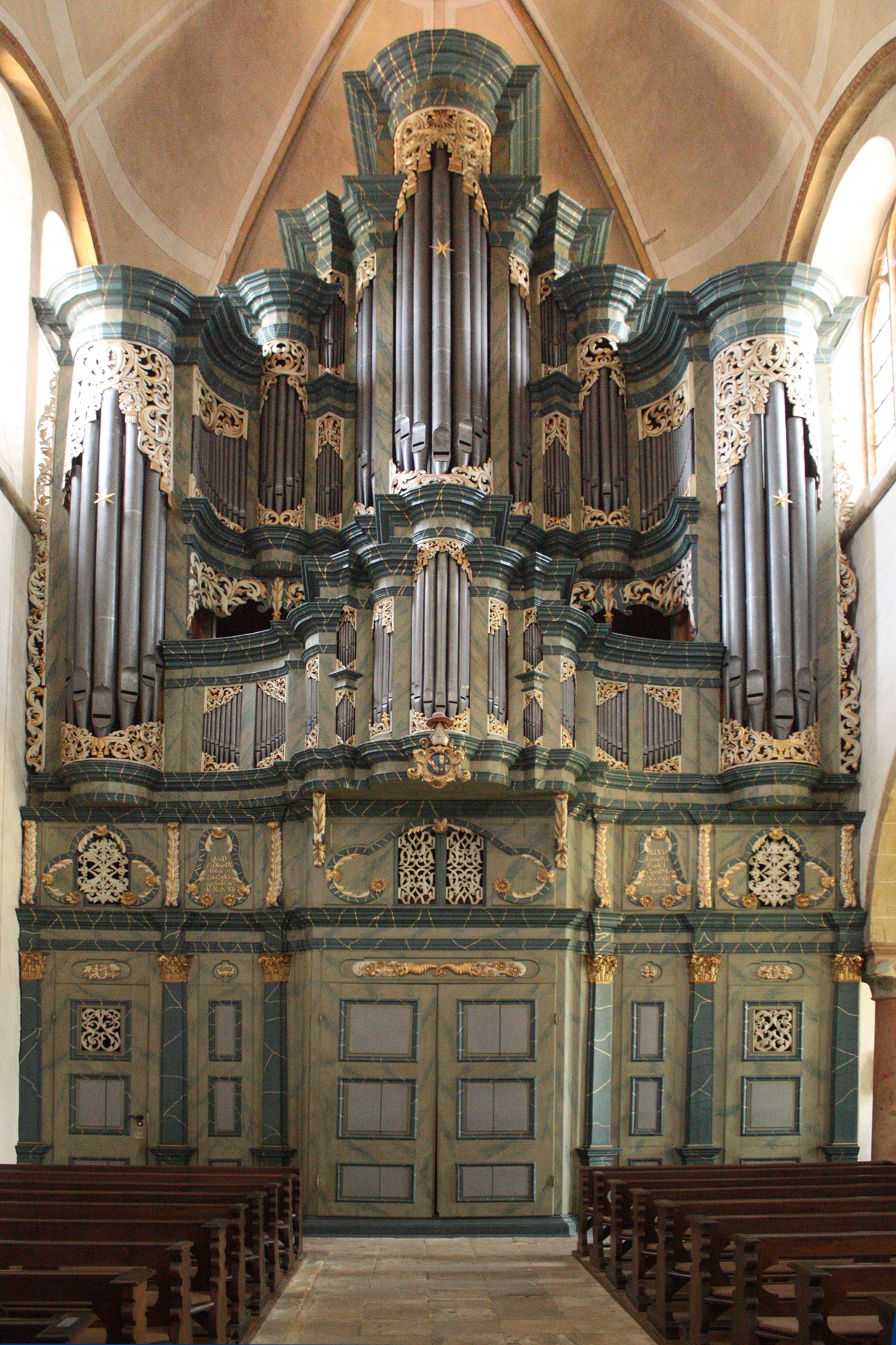 Orgel von Johann Patroclus Möller im ehem. Kloster Marienfeld